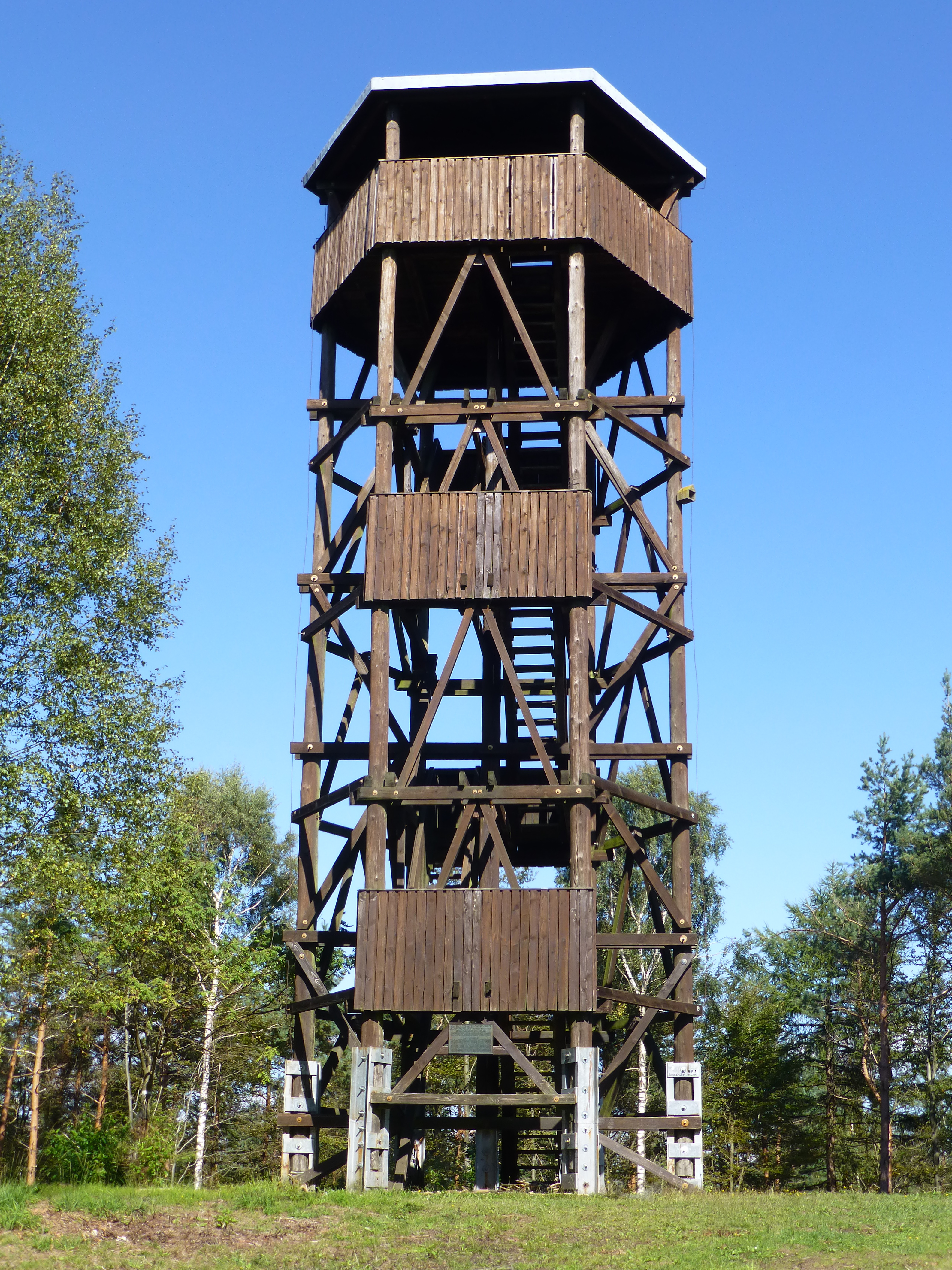 Der Schindhübelturm 2015